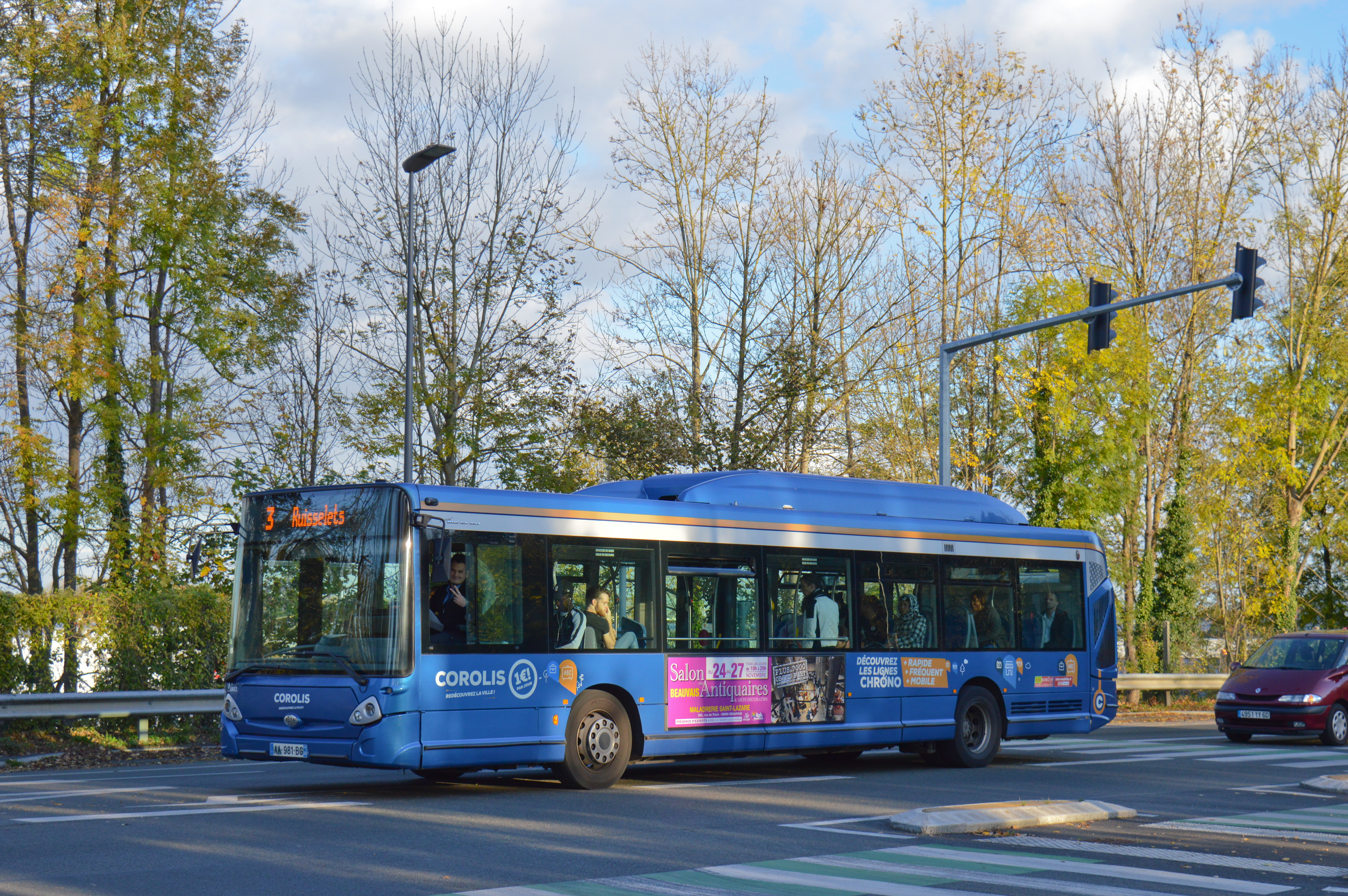 GX 327 sur la ligne 3 du réseau Corolis